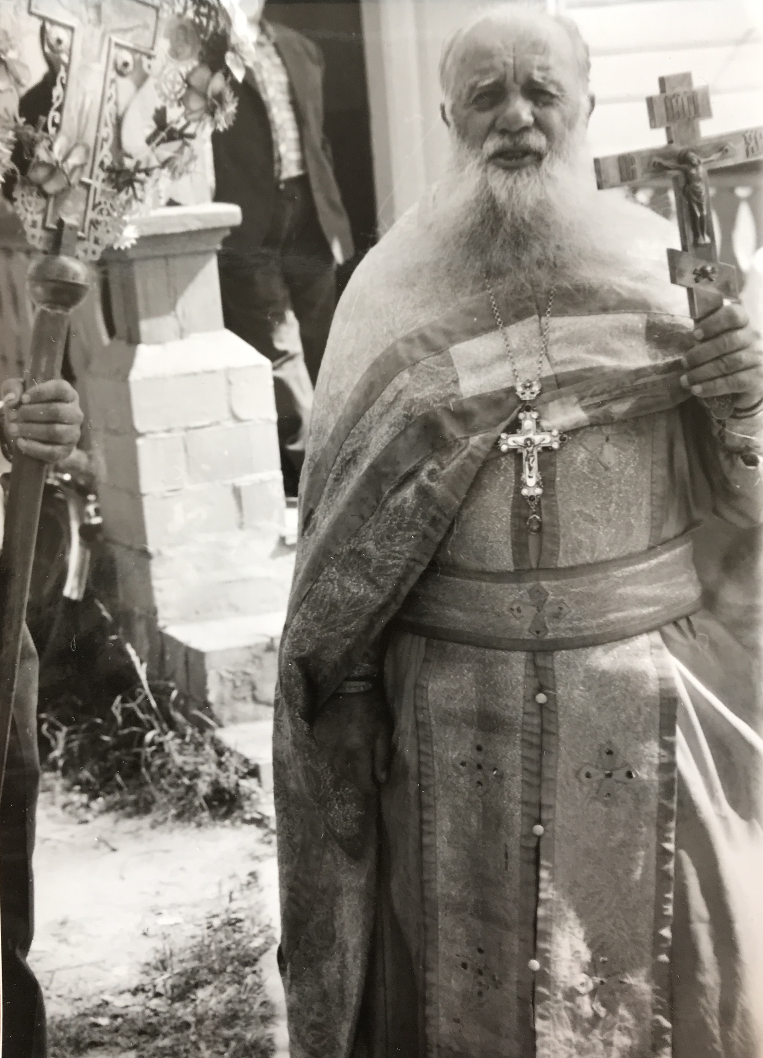 о. Александр Варницкий на службе в д. Оздамичи